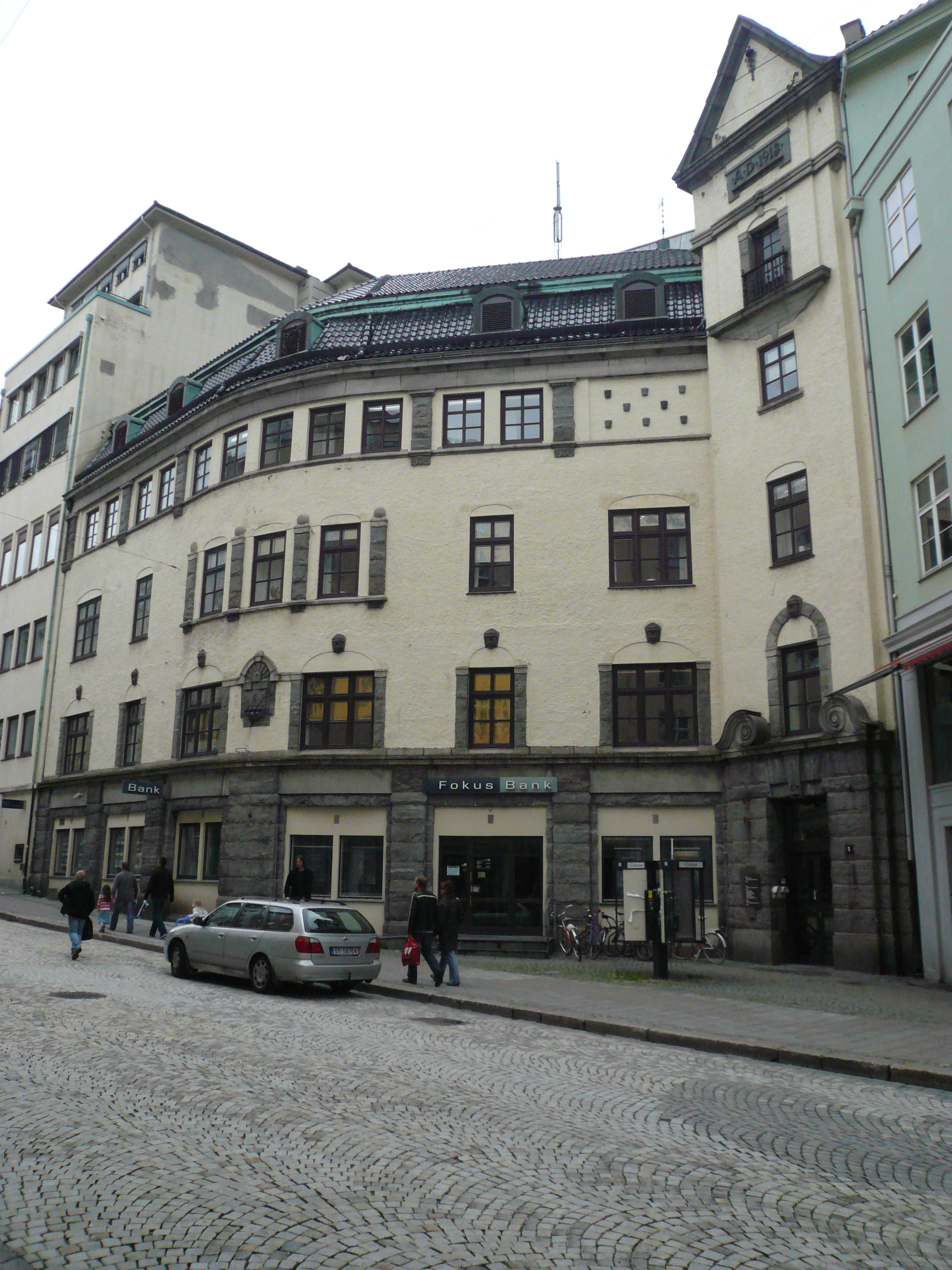 Bergens telefonkompagni, fasade tegnet av arkitekt Einar Oscar Schou